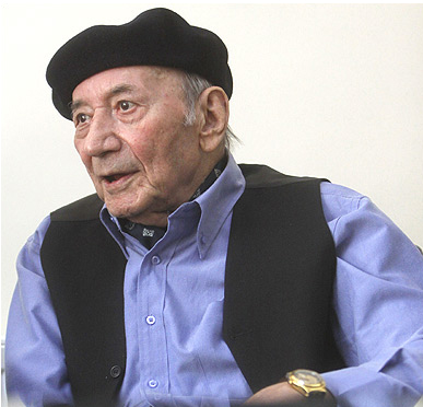 جلیل شهناز در مراسم نوگشایی خانه موسیقی ۲ اردیبهشت ۱۳۸۹